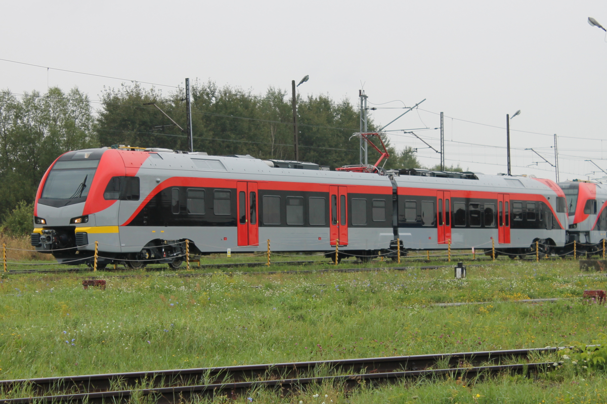 Stadler FLIRT3 dla ŁKA na terenie zakładu Stadler Polska w Siedlcach. This photo was taken during Railway Wikiexpedition 2014 set up by Wikimedia Polska Association in cooperation with Fundacja Grupy PKP. You can see all photographs in category Wikiekspedycja kolejowa 2014.